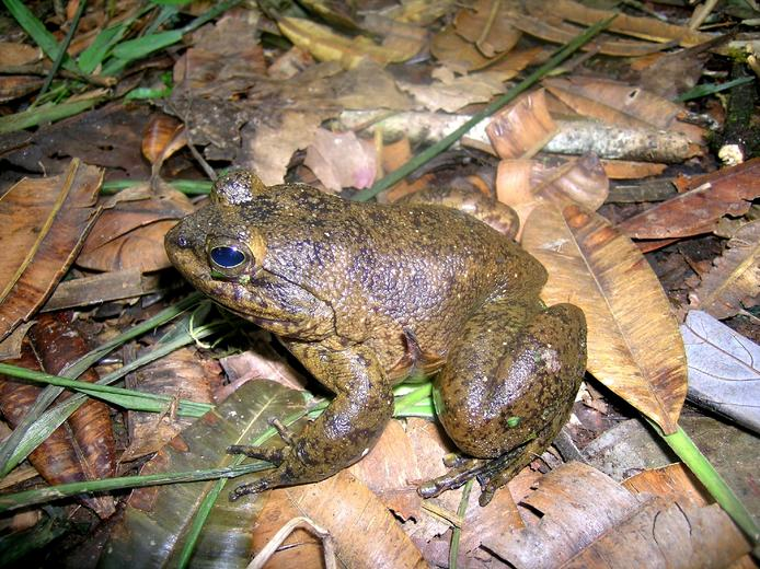 Ranomafana National Park Mantidactylus guttulatus